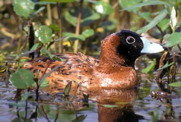 Fotografía del autor